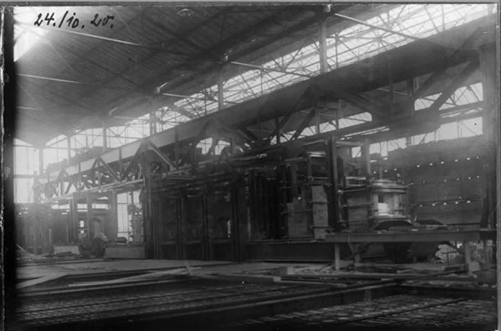 De smelterij van de Demka staalfabriek in Zuilen/Utrecht in aanbouw in 1920. Met name de metaalindustrie was in die tijd in Utrecht een grote werkgever.